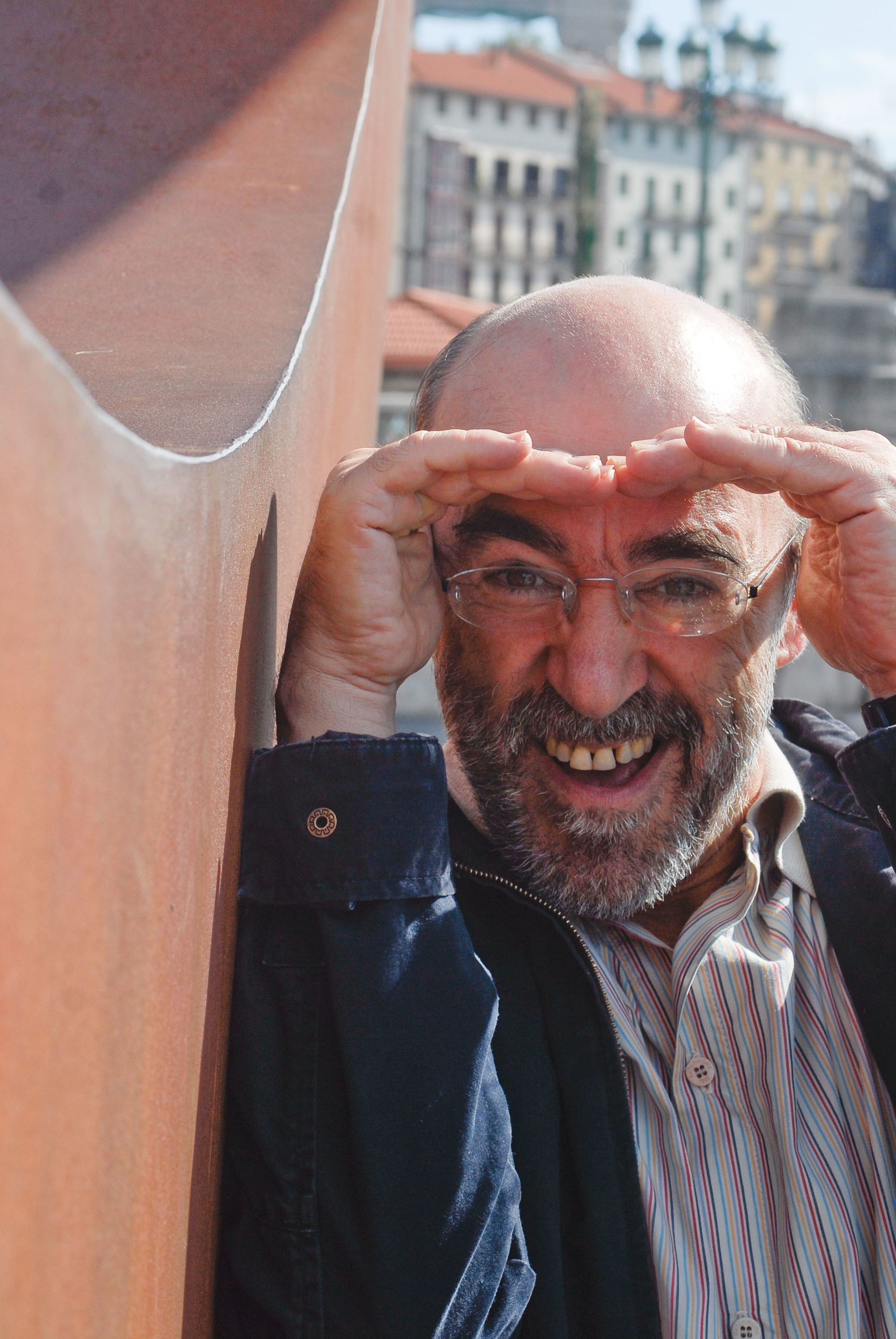 cc-by-sa "Prest" aldizkaria - . Alex Angulo aktore erandioztarra zena.